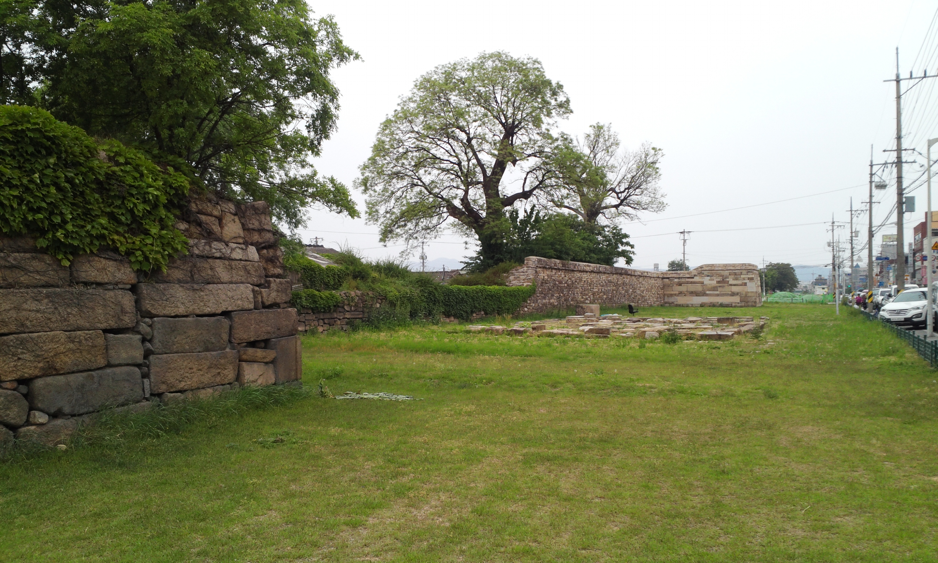 경상북도 경주읍성